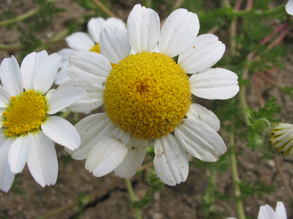 Pablo Alberto Salguero Quiles